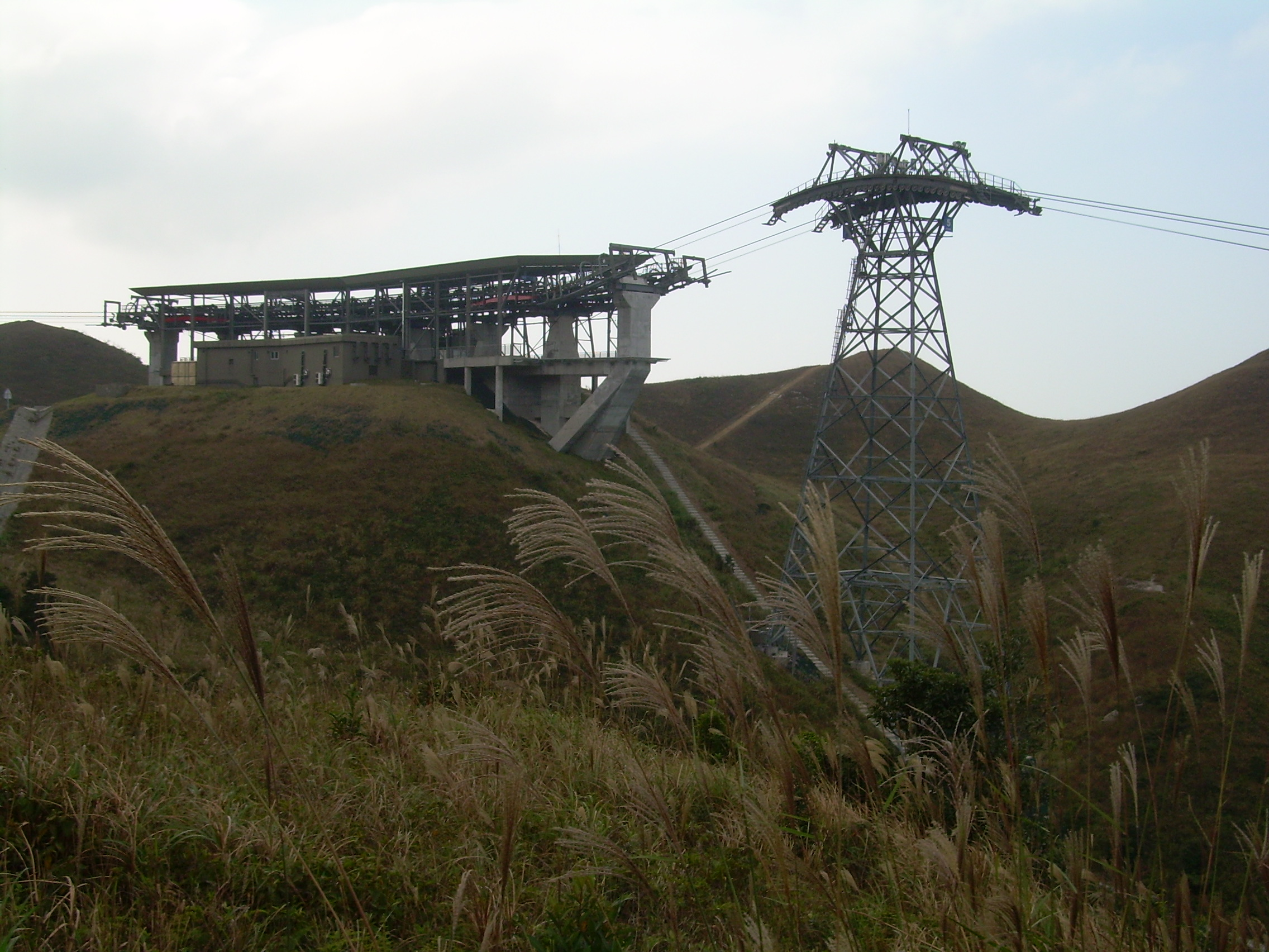 昂平360 - 彌勒山轉向站